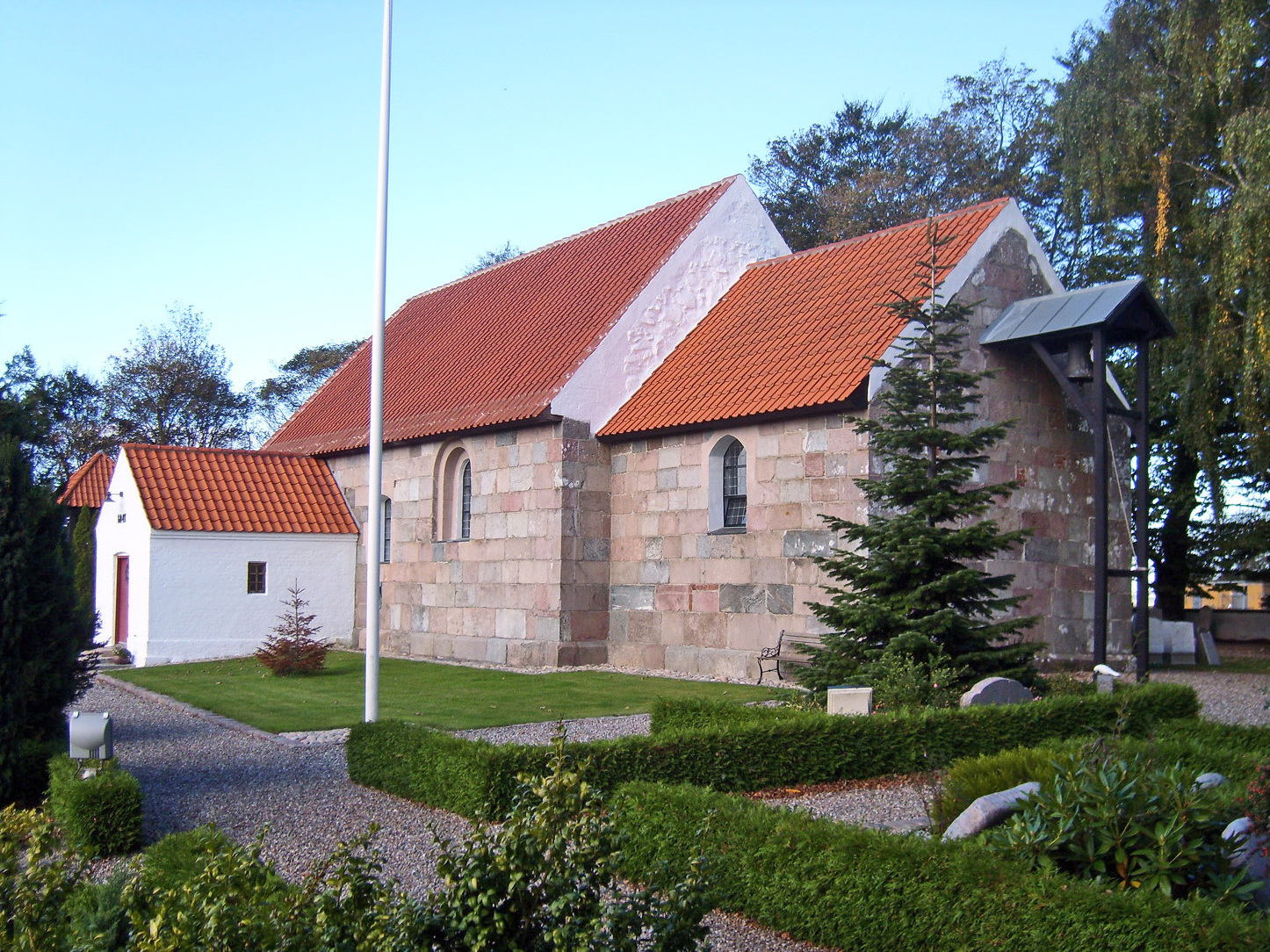 fra syd